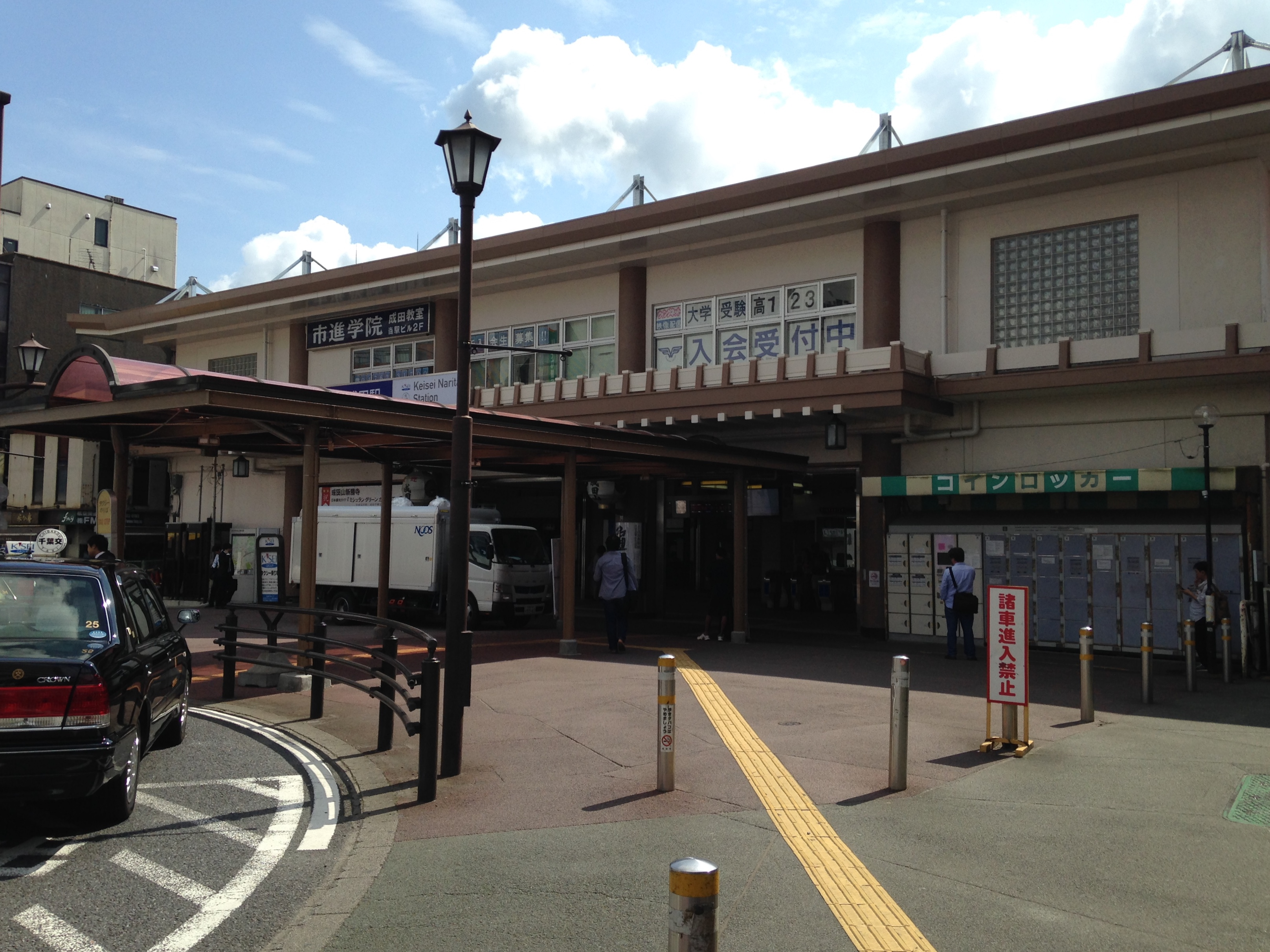 京成成田駅の駅舎